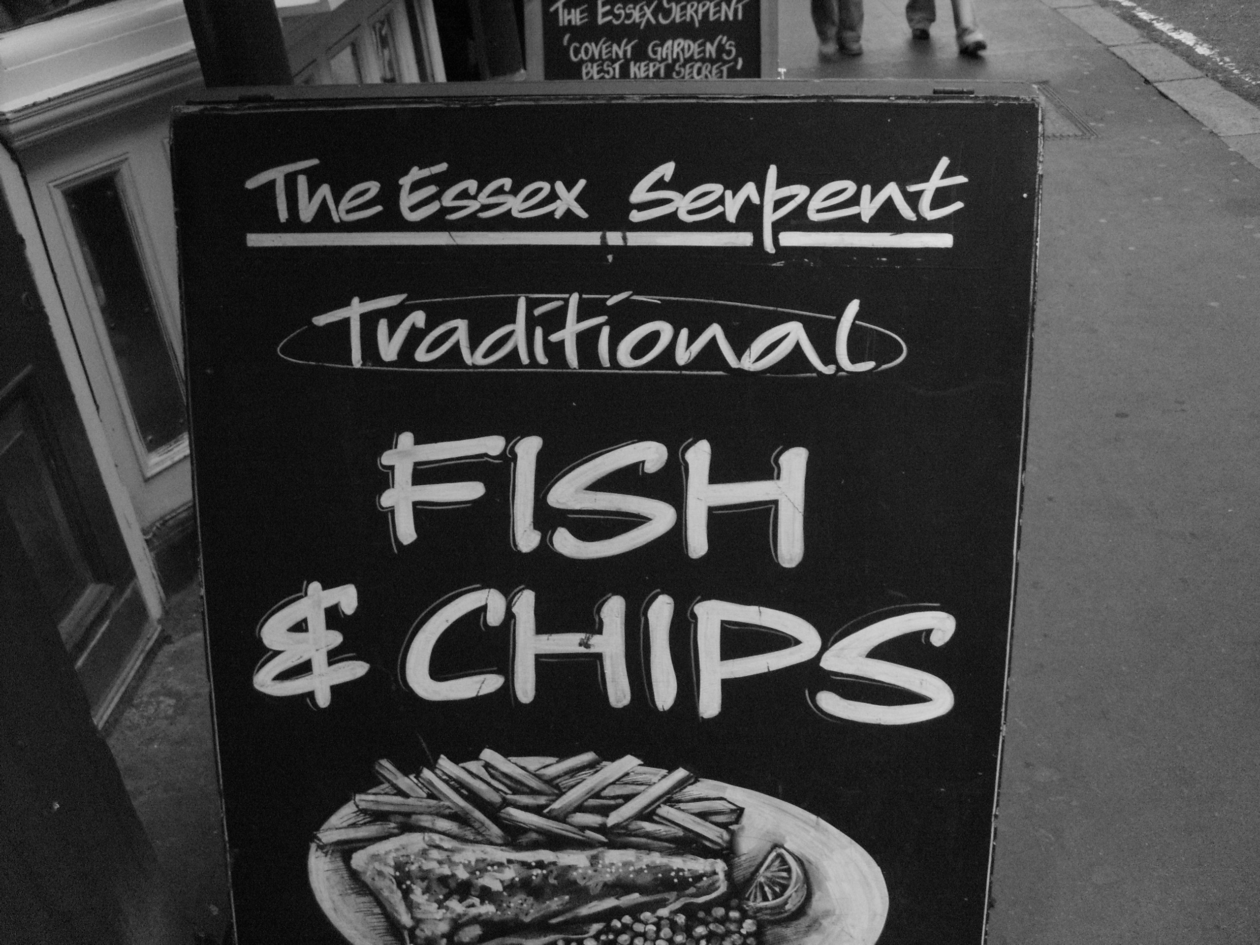 The Essex Serpent, King Street, Covent Garden, London.